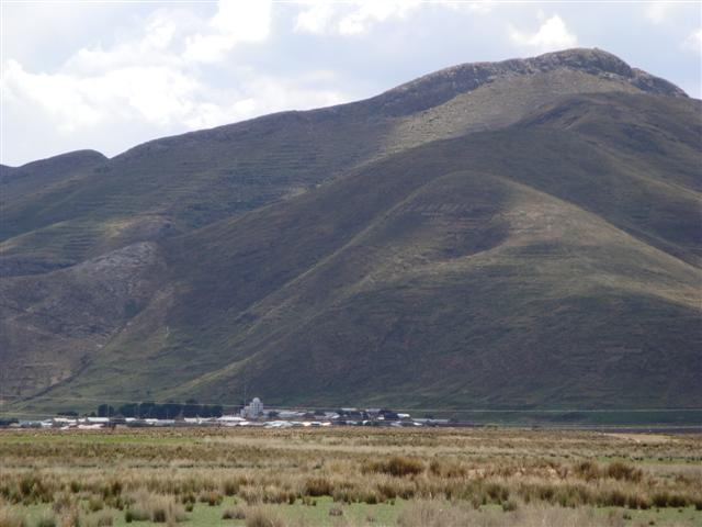 Vista panorámica del distrito de Nicasio. Al fondo se ve el gran cerro Pucarani. Este cerro guarda varios secretos arqueológicos, en su mayoría, por descubrirse.